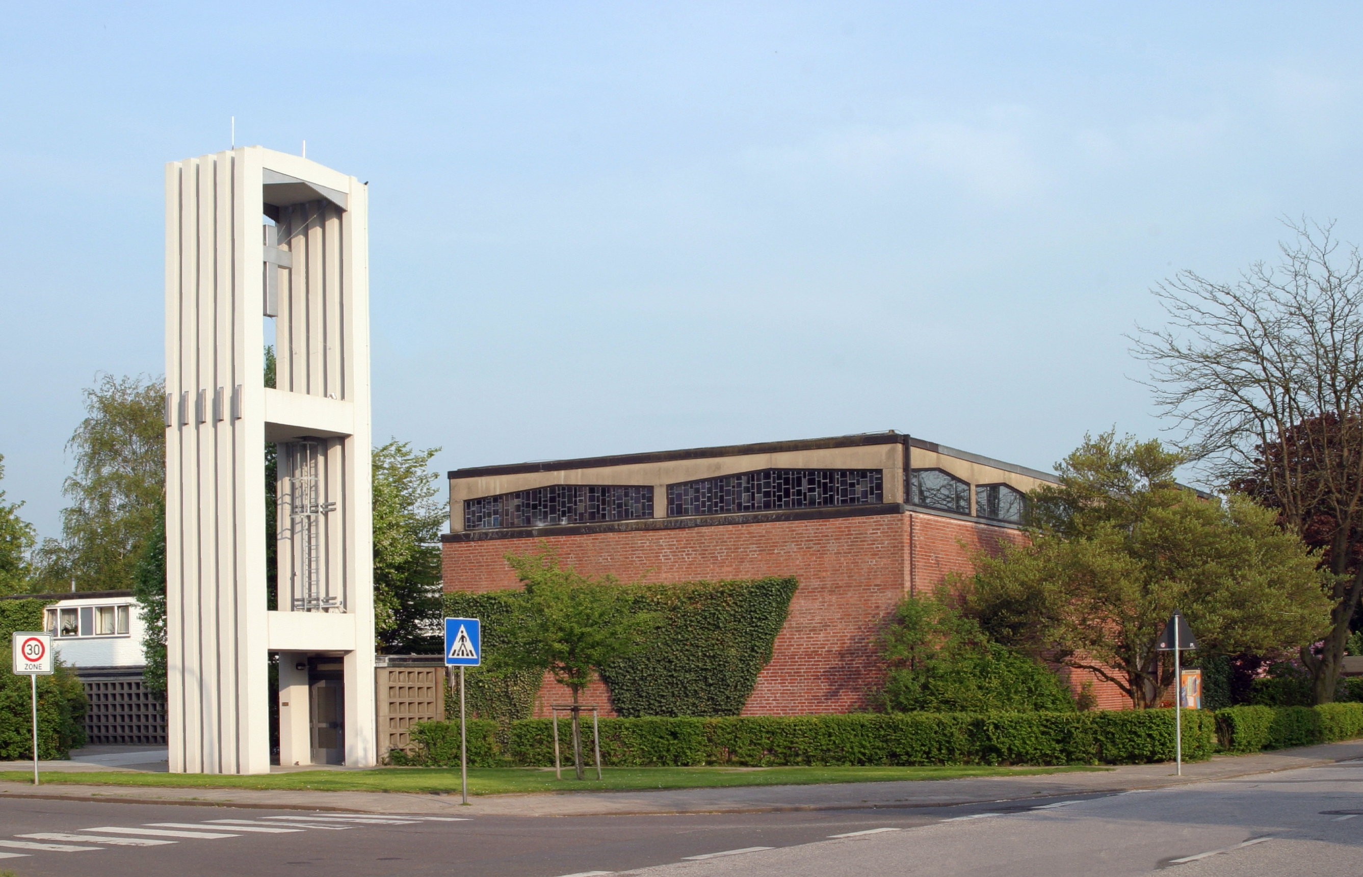 Friedrich-von-Bodelschwingh-Kirche, Luebeck Germany